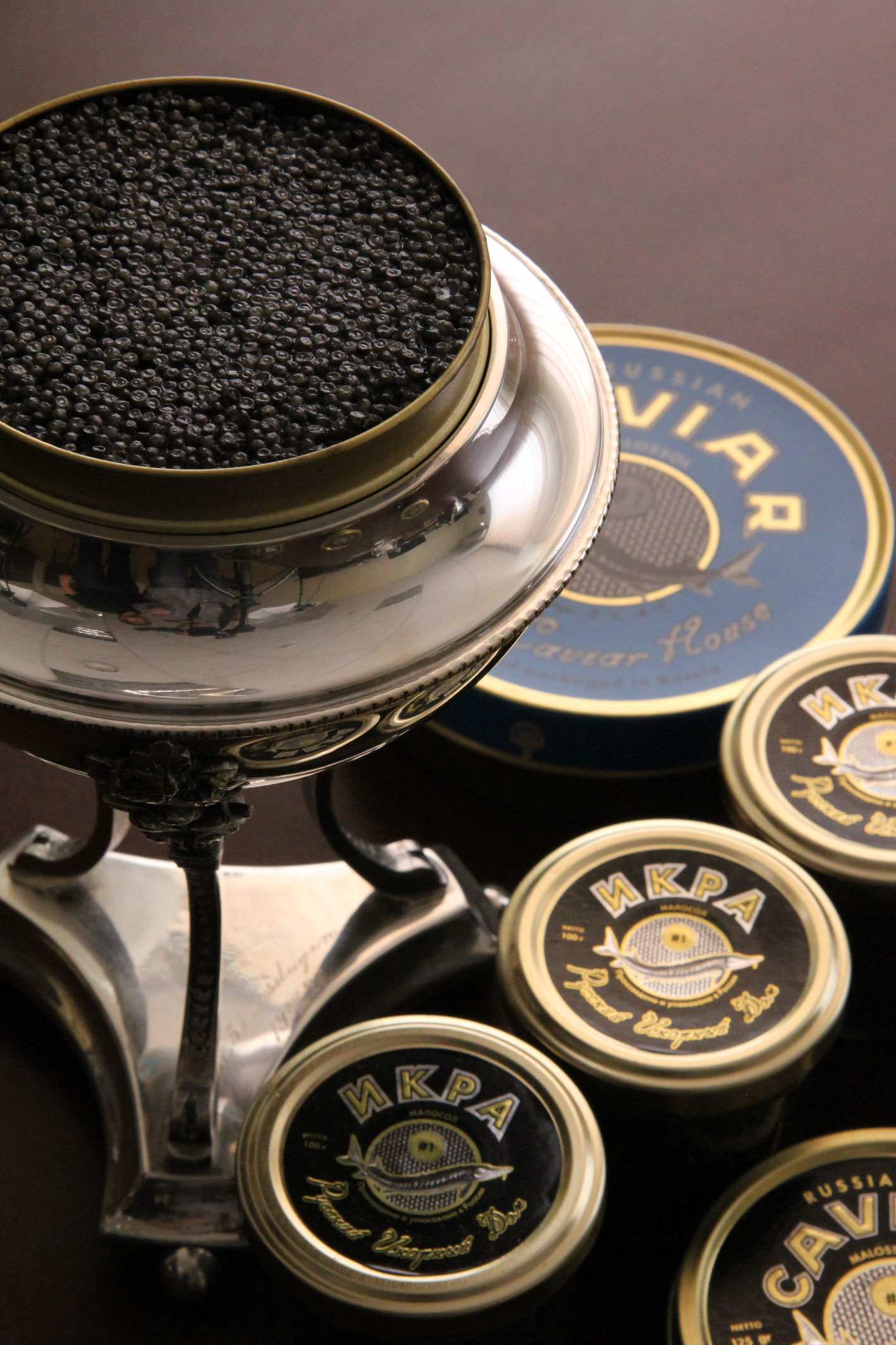 Икра группы компаний "Русский икорный дом"